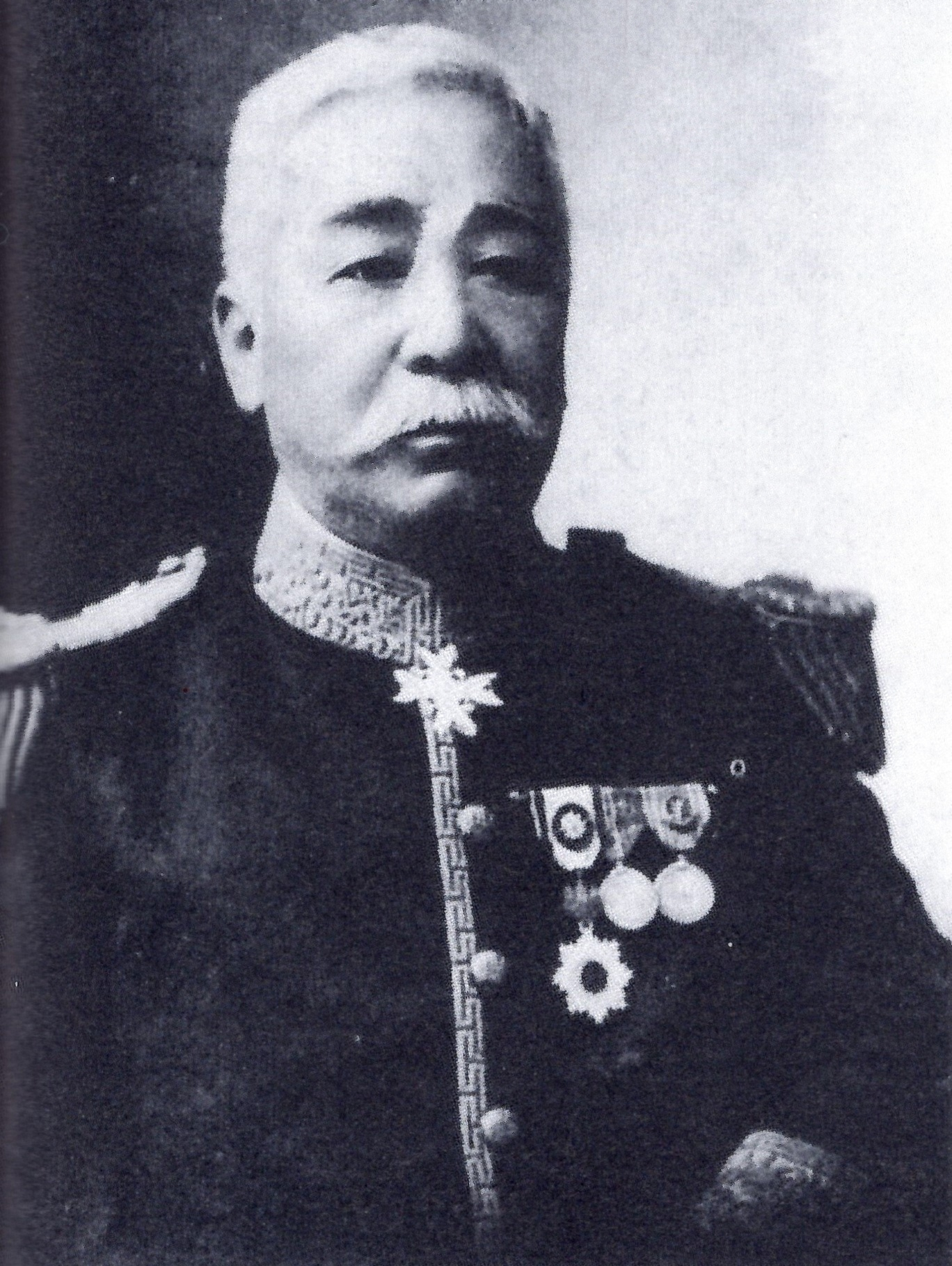 一柳末徳の肖像写真。